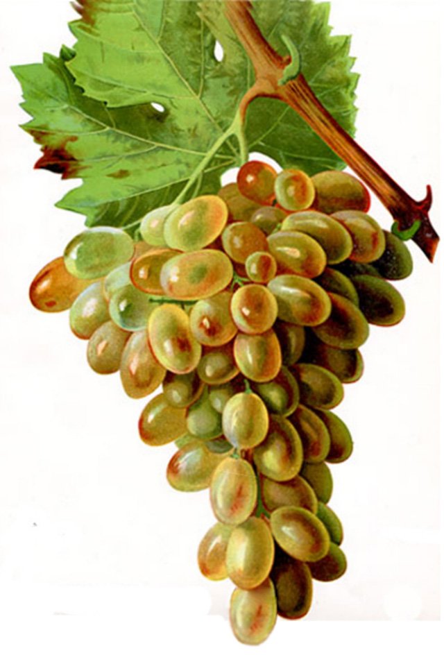 Grappe de Dattier de Beyrouth par Viala et Vermorel